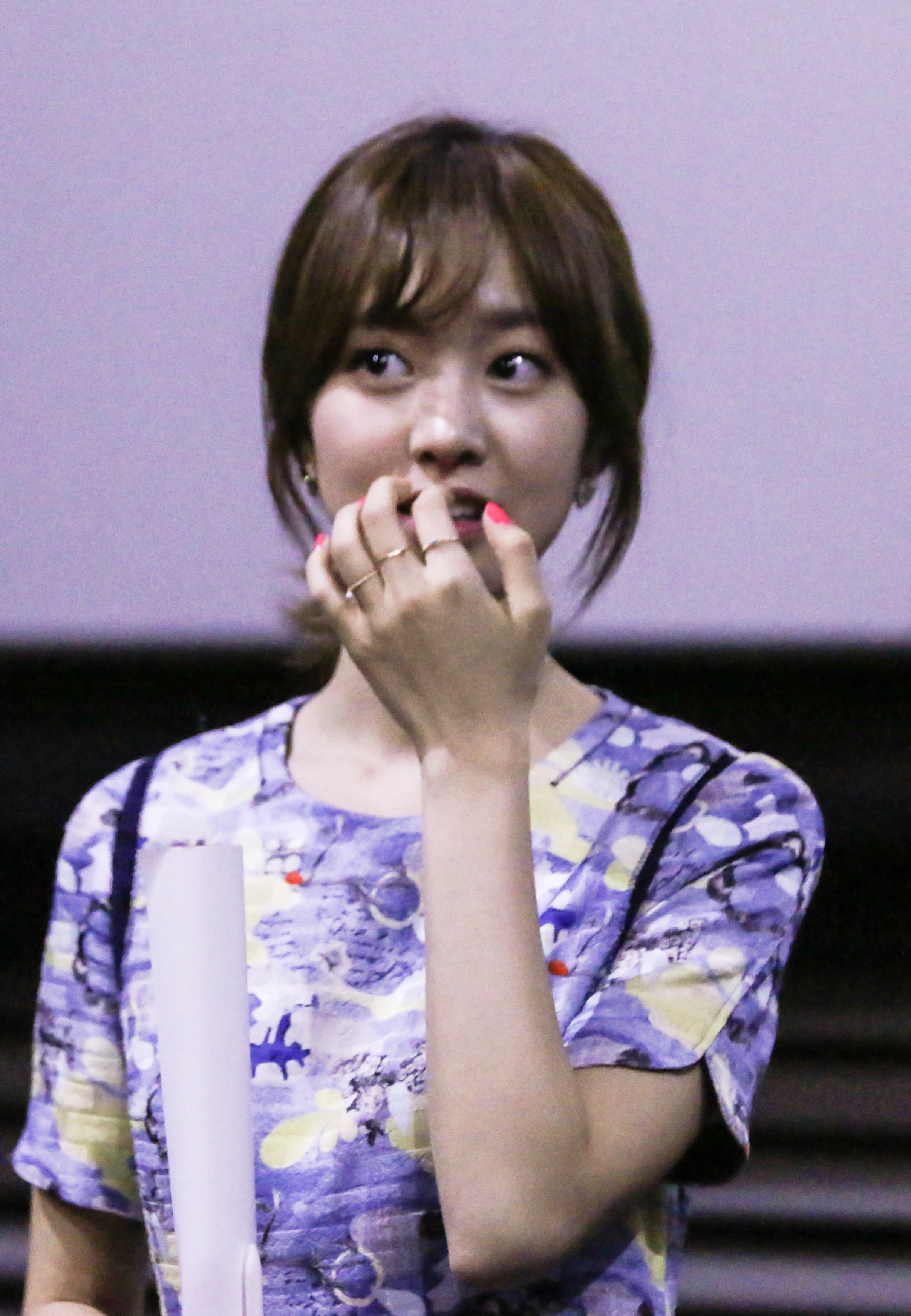 150505 진세연 CGV중계 위험한상견례2 무대인사